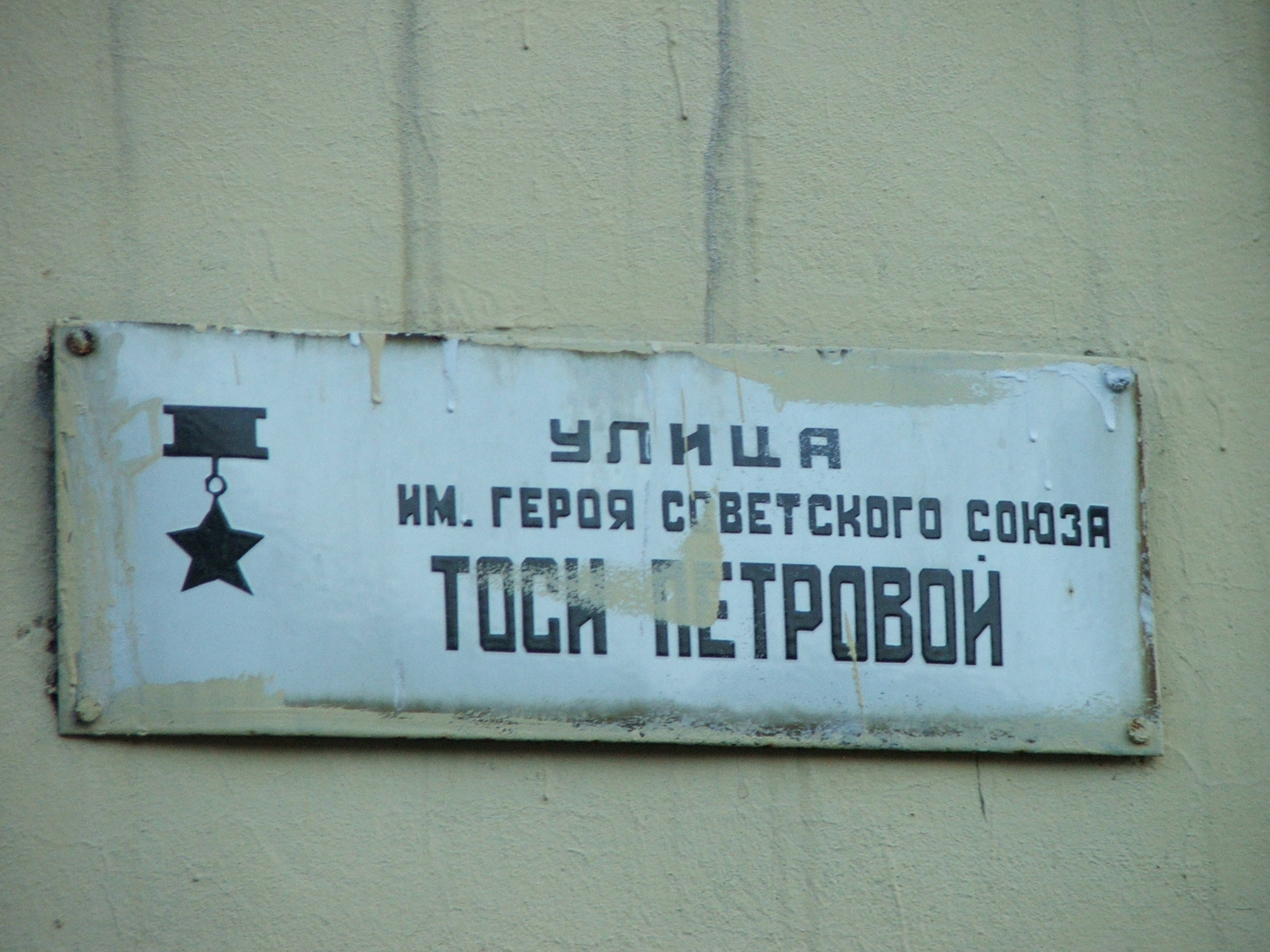 Указатель на улице Тоси Петровой в г. Луга, Лен.обл.